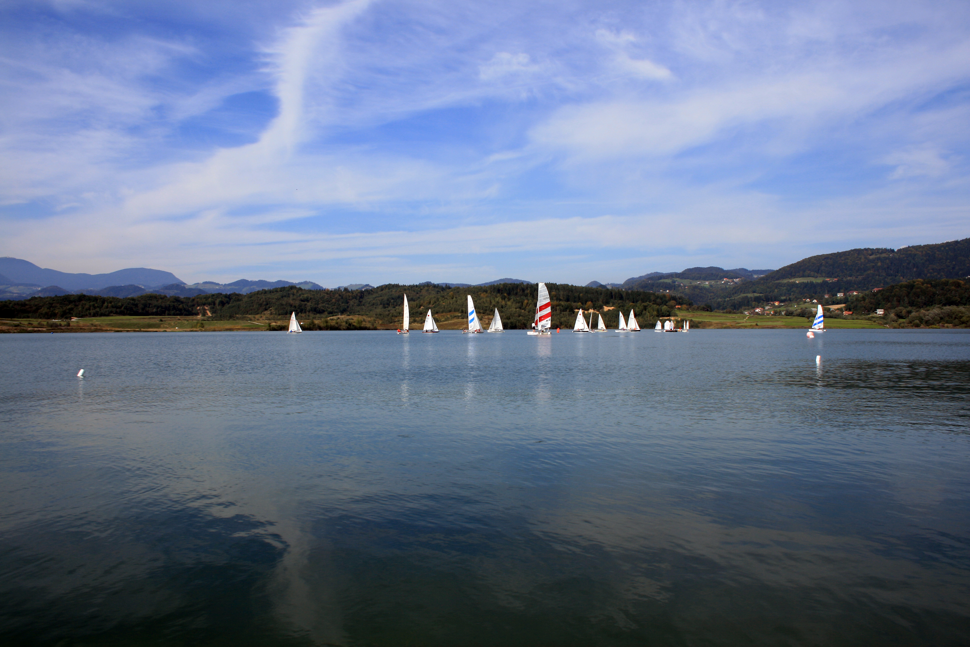 Velenjsko jezero